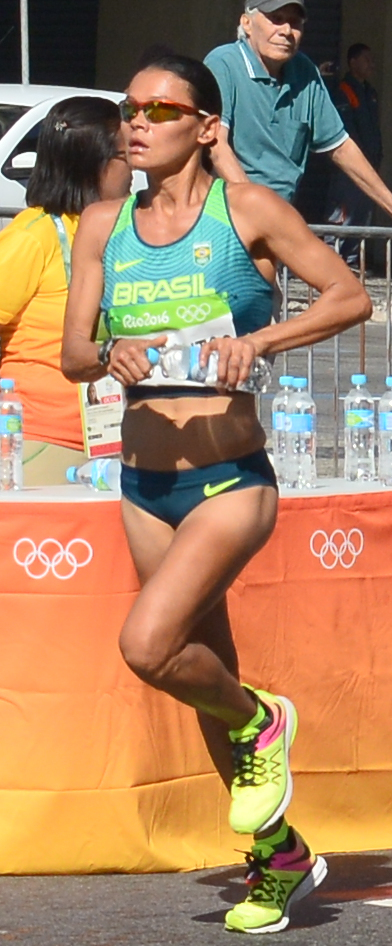 Passage du marathon des jeux olympiques de Rio 2016 dans le centre de Rio